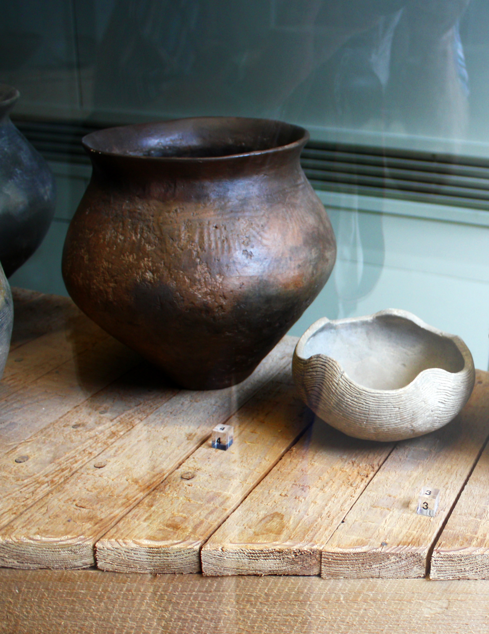 RGM Köln, Funde im Römisch-Germanischen Museum aus der Frühen Eisenzeit. Urne aus Altenrath im Siegkreis (Wahner Heide) Abb. Nr.4, Zipfelschale aus Köln-Fühlingen (Nr.3)